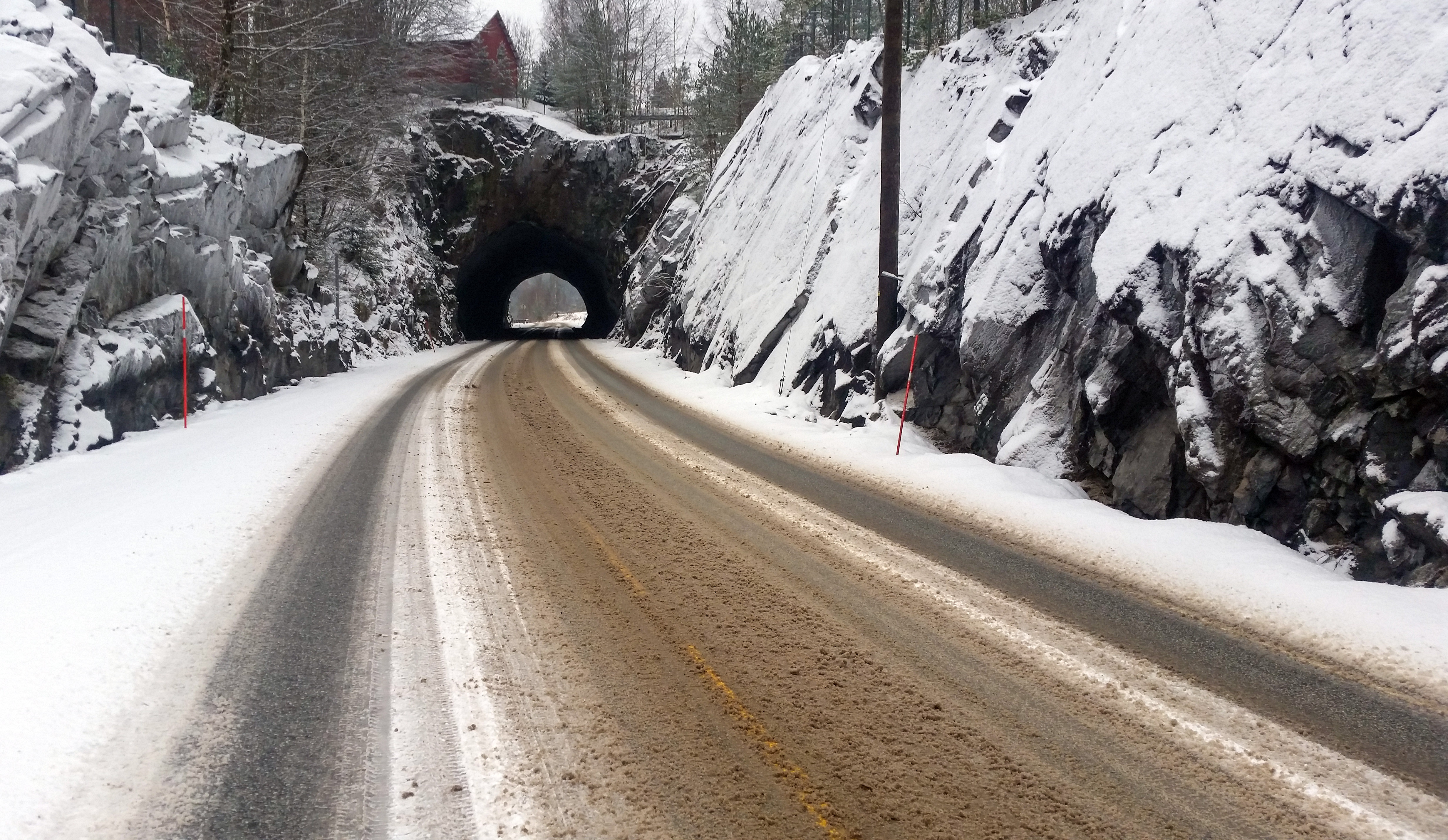 Egddalstunnelen, fylkesvei 71, Aust-Agder